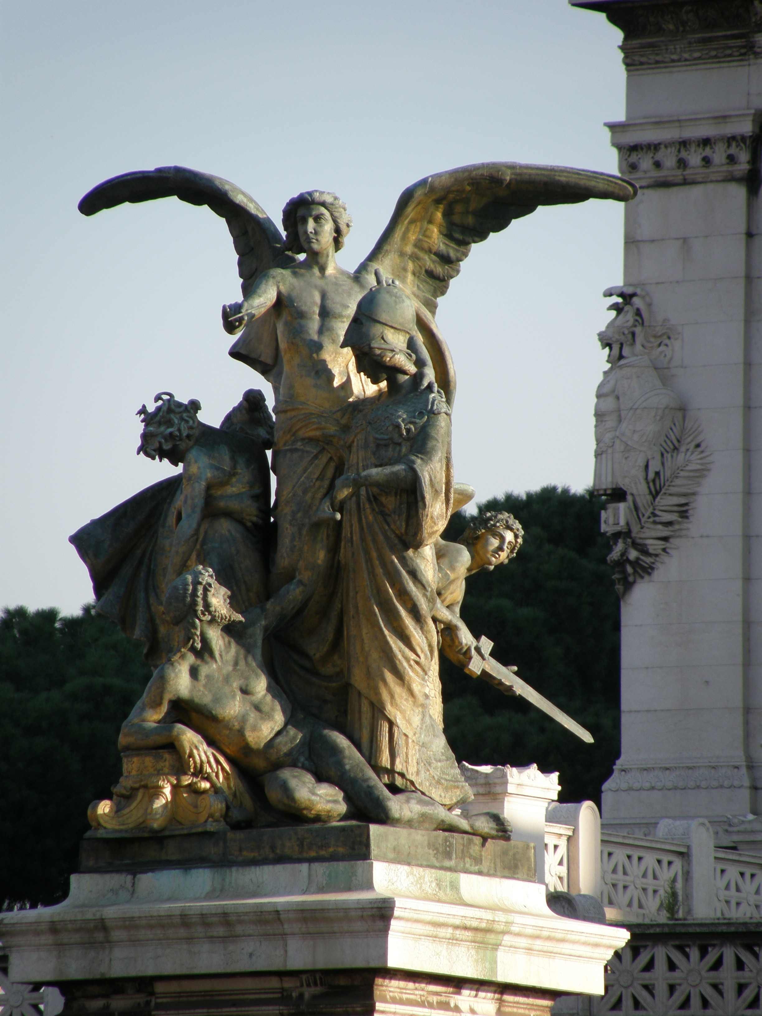 Rome - Italy, Vittoriano Gruppo de "Il Pensiero", Giulio Monteverde. Photo taken from Piazza Venezia.